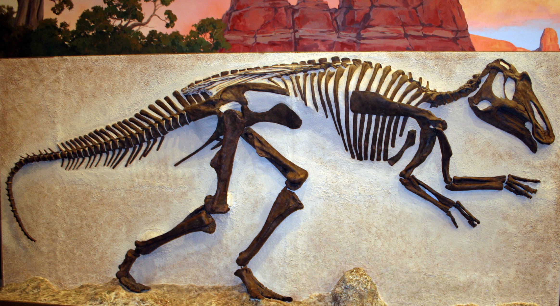 Prosaurolophus panel mount